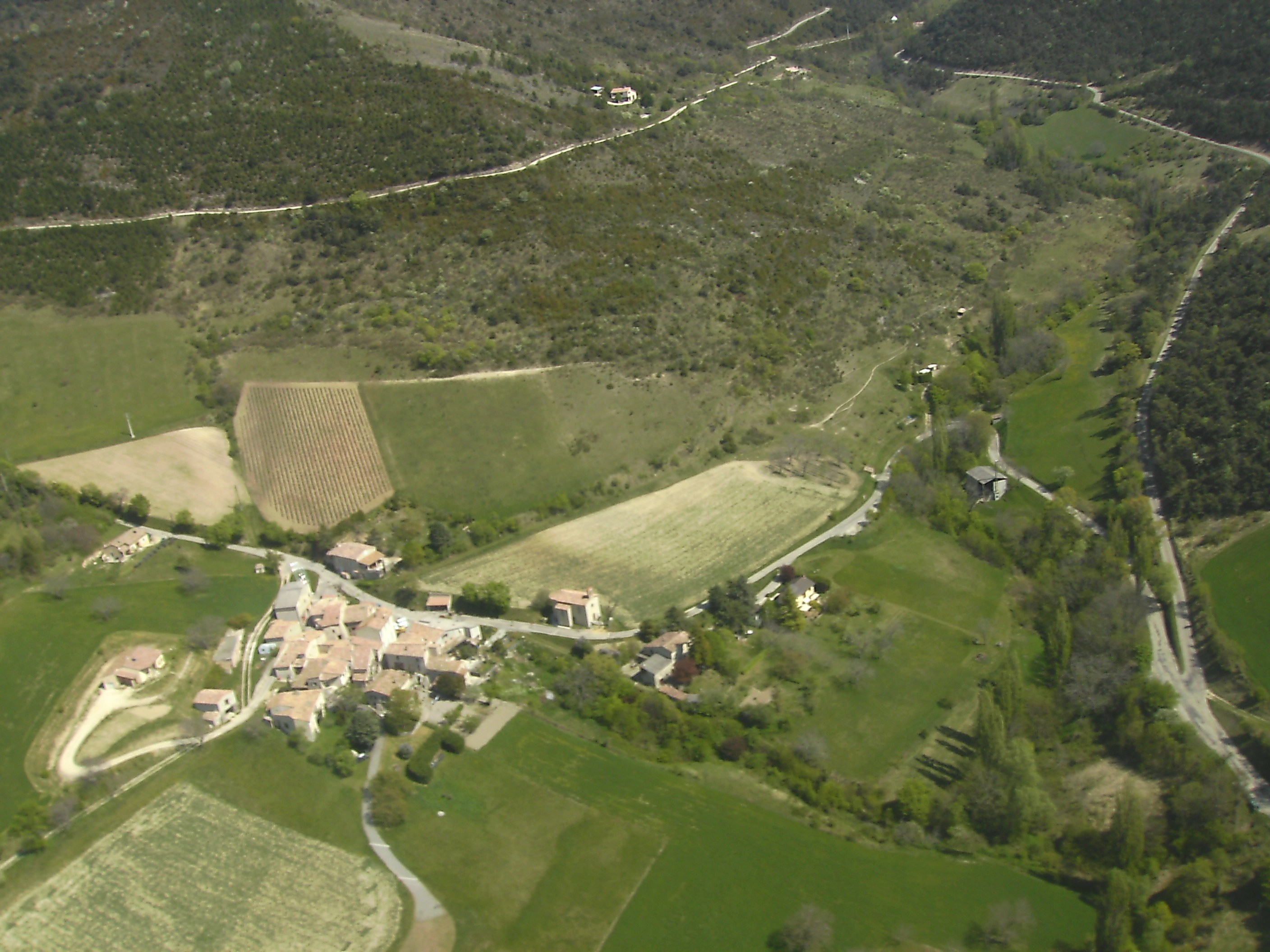 vue du ciel